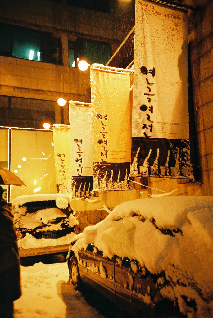 Daehakro in Seoul